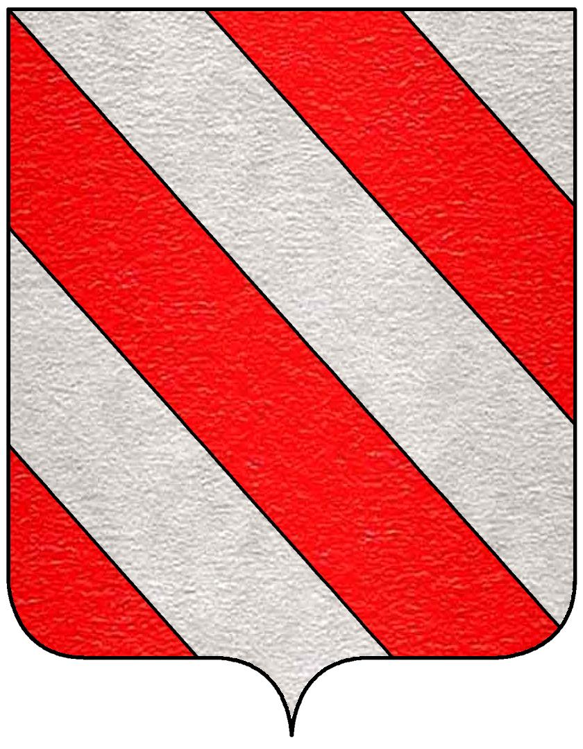 Stemma della famiglia Baroncelli